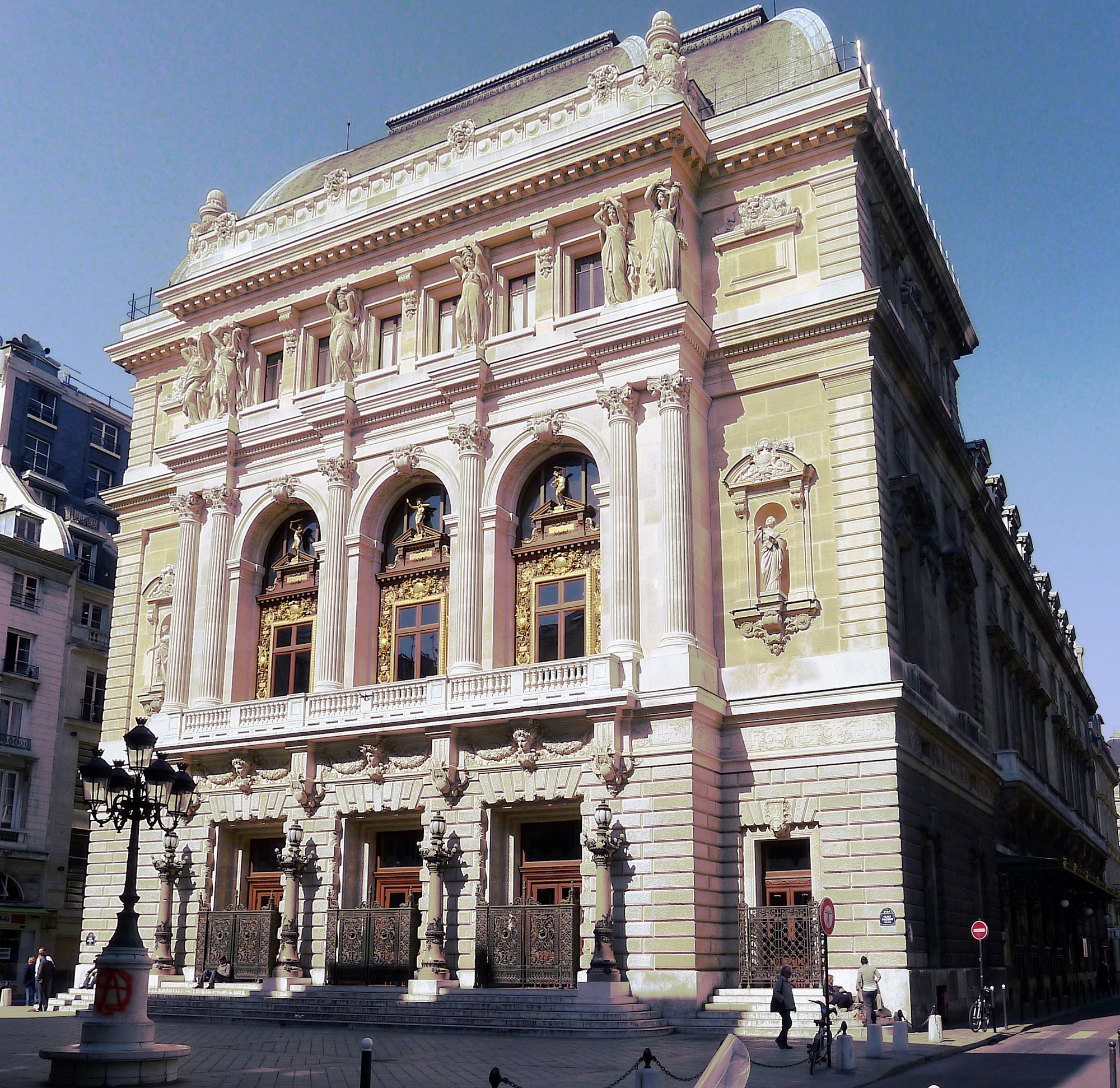 Opéra-comique (dit salle Favart) sur la place Boïeldieu - Paris II